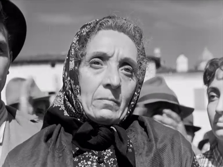 Isabella Riva nel film Il mulino del Po (1949)